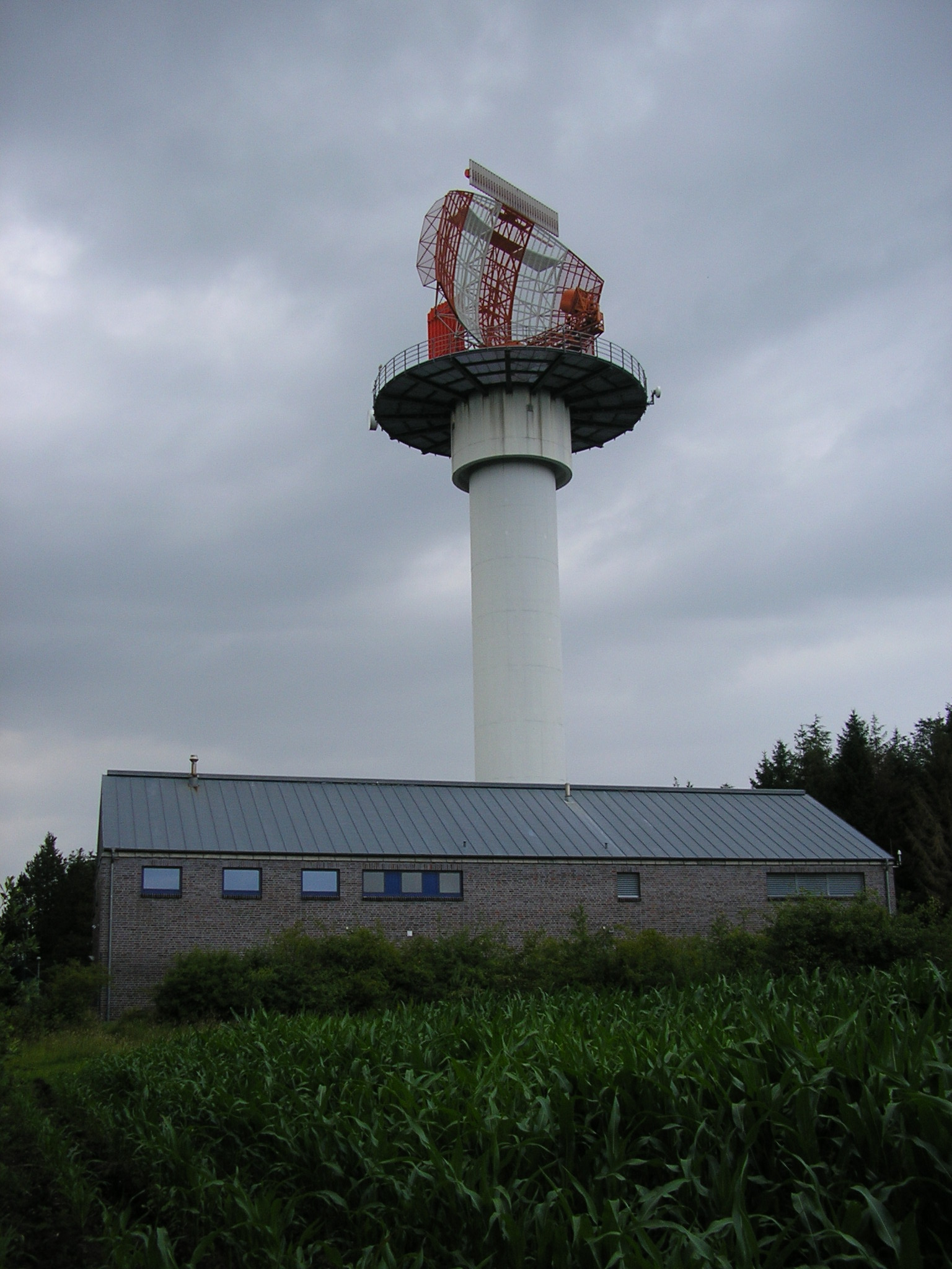 SREM-Radaranlage Nordholz bei Cuxhaven